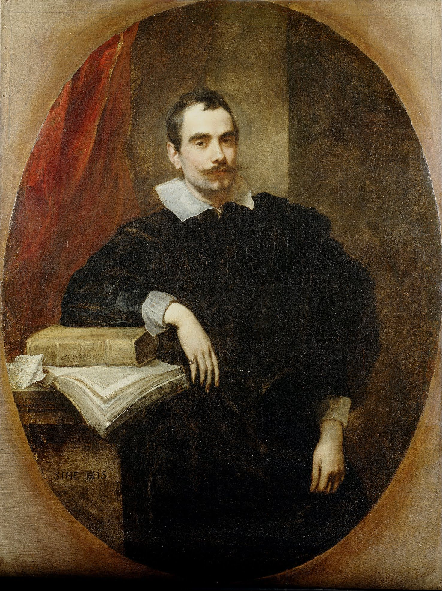 Ritratto di Ottaviano Canevari - olio su tela. The Frick Collection - New York